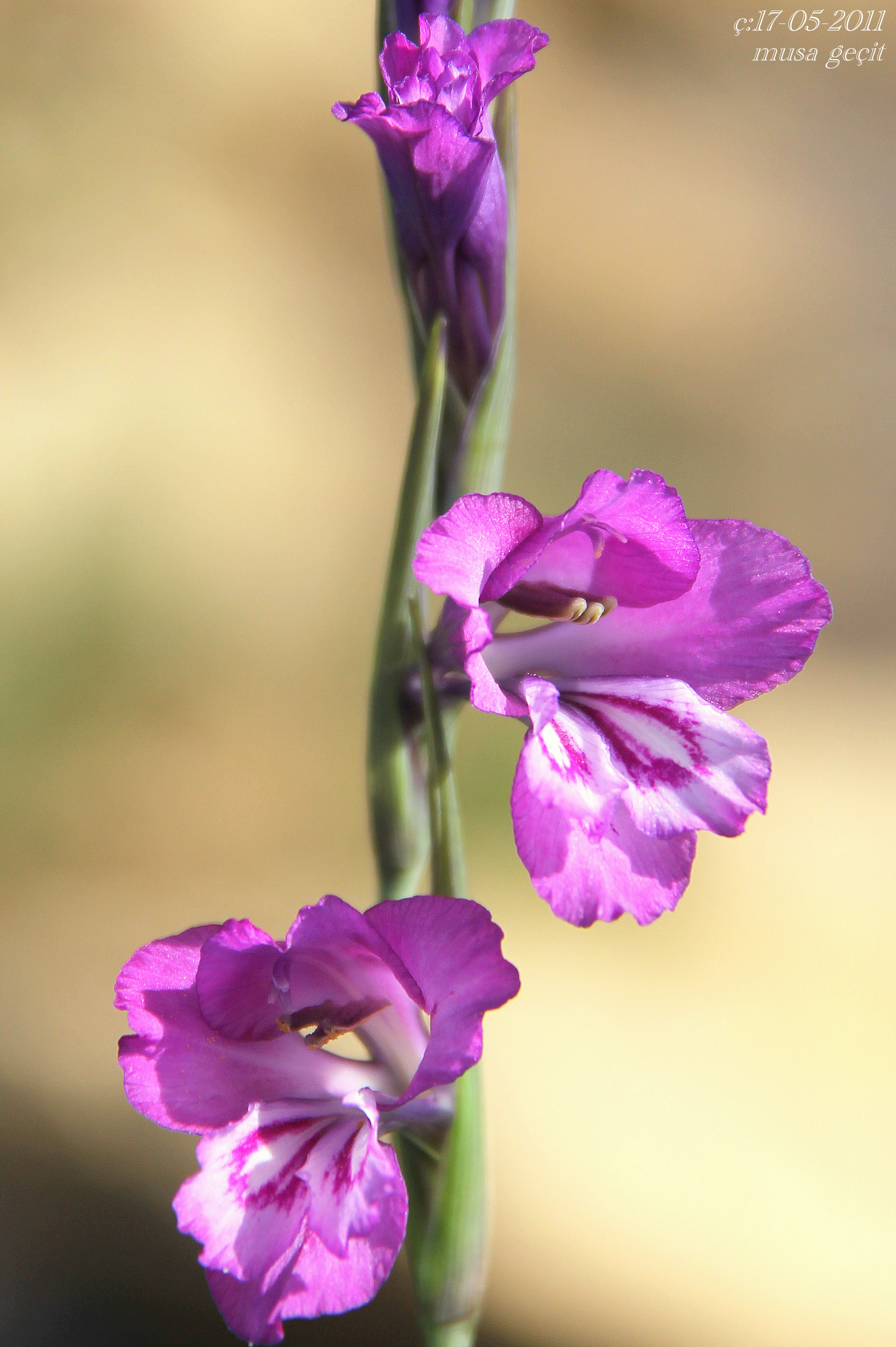 Genus: Gladiolus. Mardinde çekilmiştir.